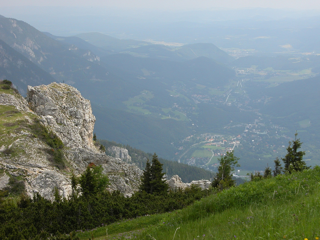 Rax